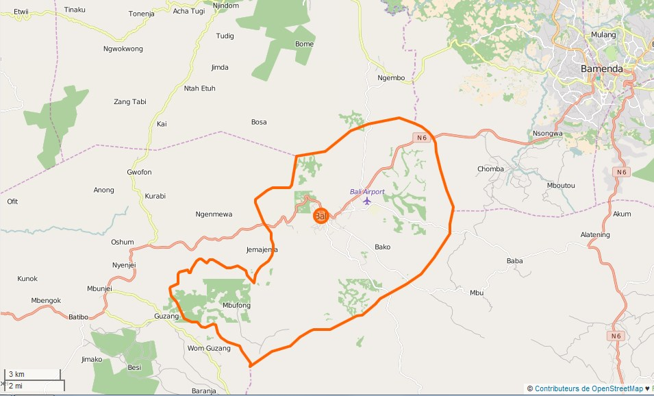 Bali (Cameroun) Limite communale This map may be incomplete, and may contain errors. Don't rely solely on it for navigation.